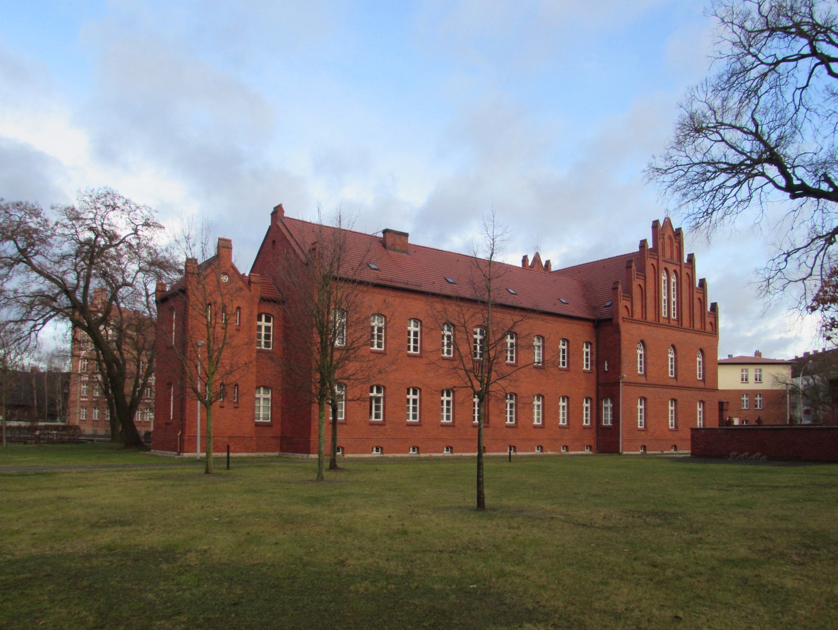 landesrechnungshof brandenburg außenstelle brb, kasernengebäuder der kürassiere magdeburger straße